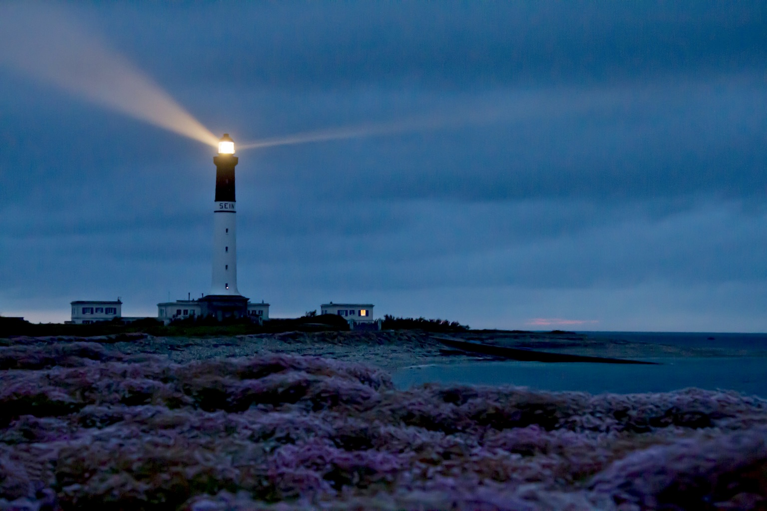 Le phare de Sein, sous le grain...